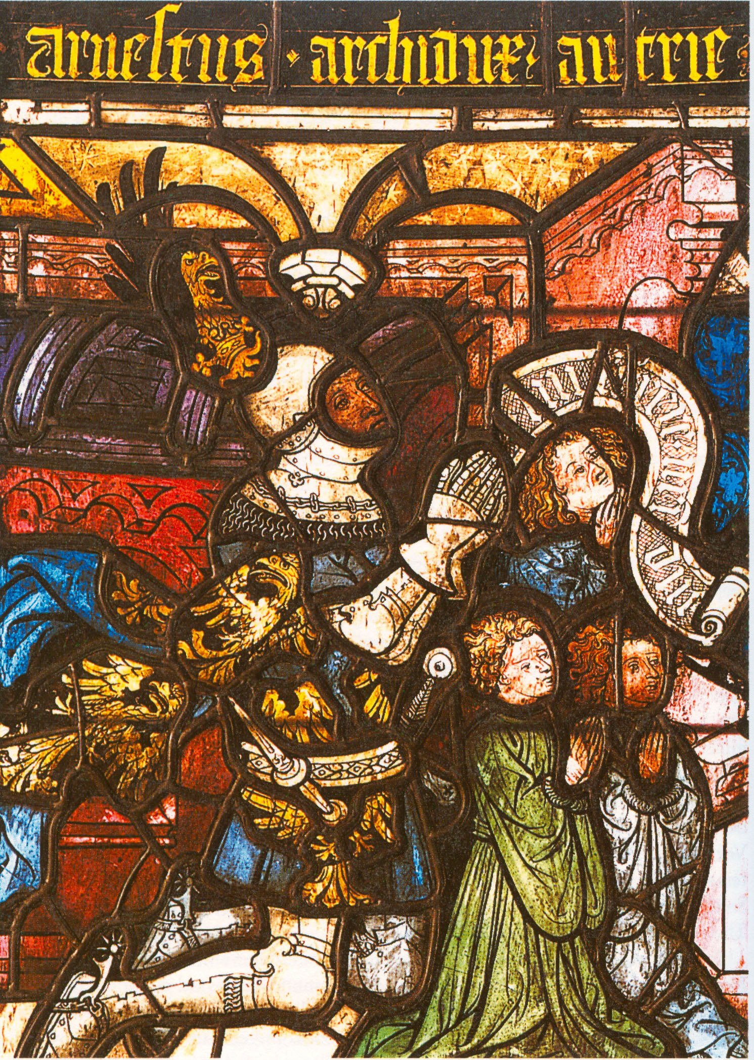 Herzog Ernst "der Eiserne" von Österreich vor ihm kniend seine Söhne Friedrich, Albrecht und Ernst Glasmalerei